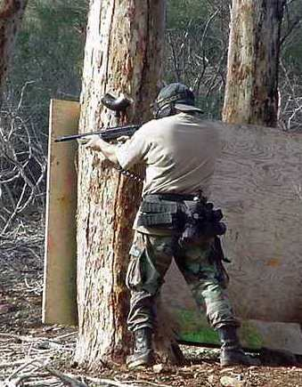 photo de paintball